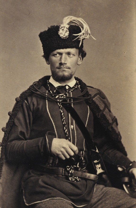 Apolinary Kurowski